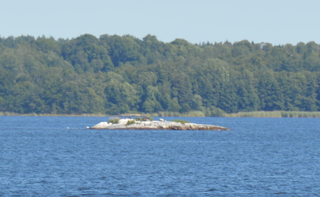 Insel Batsmanshättan